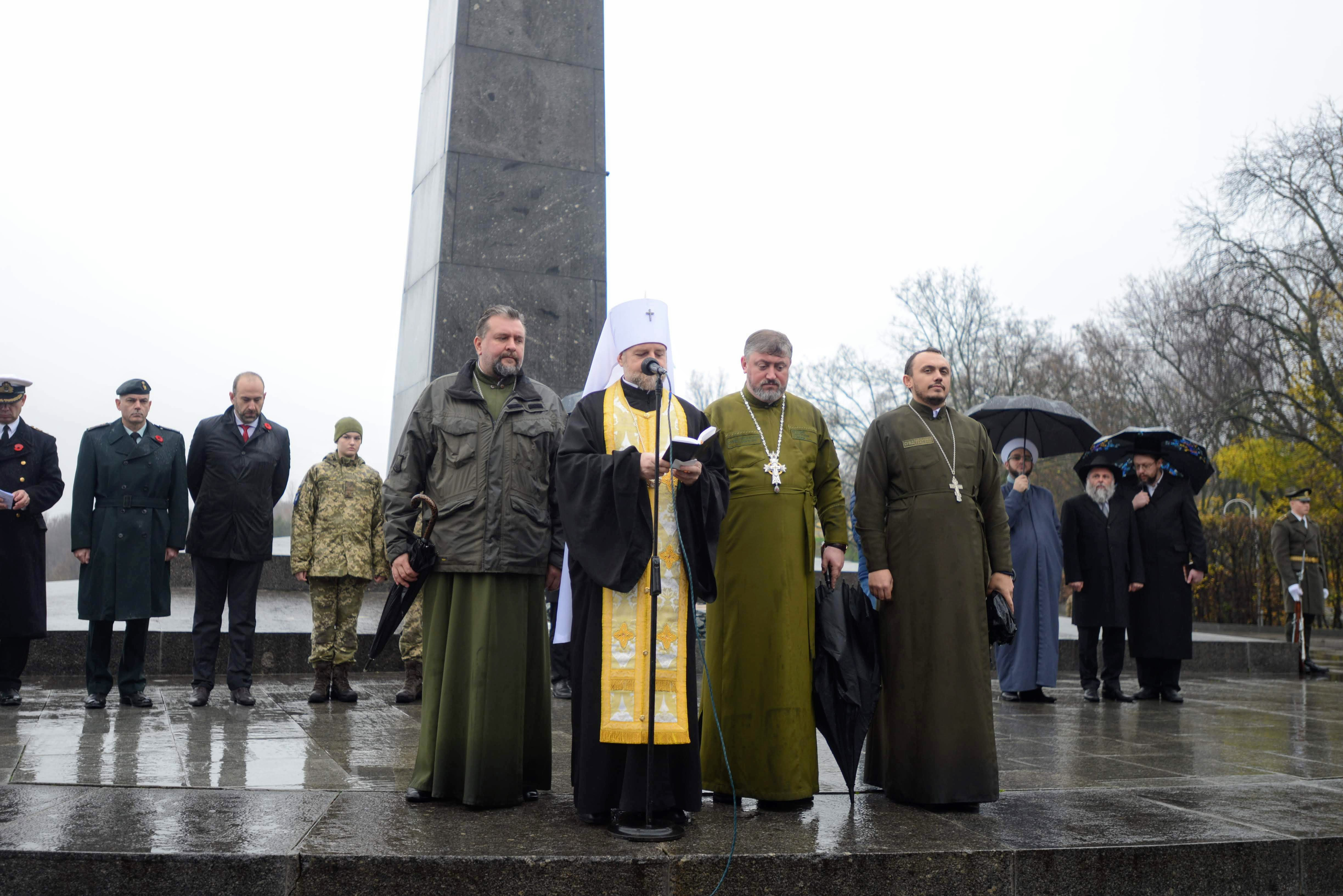 Митрополит Іоан та прот Тарас Мельник і капелани ПЦУ